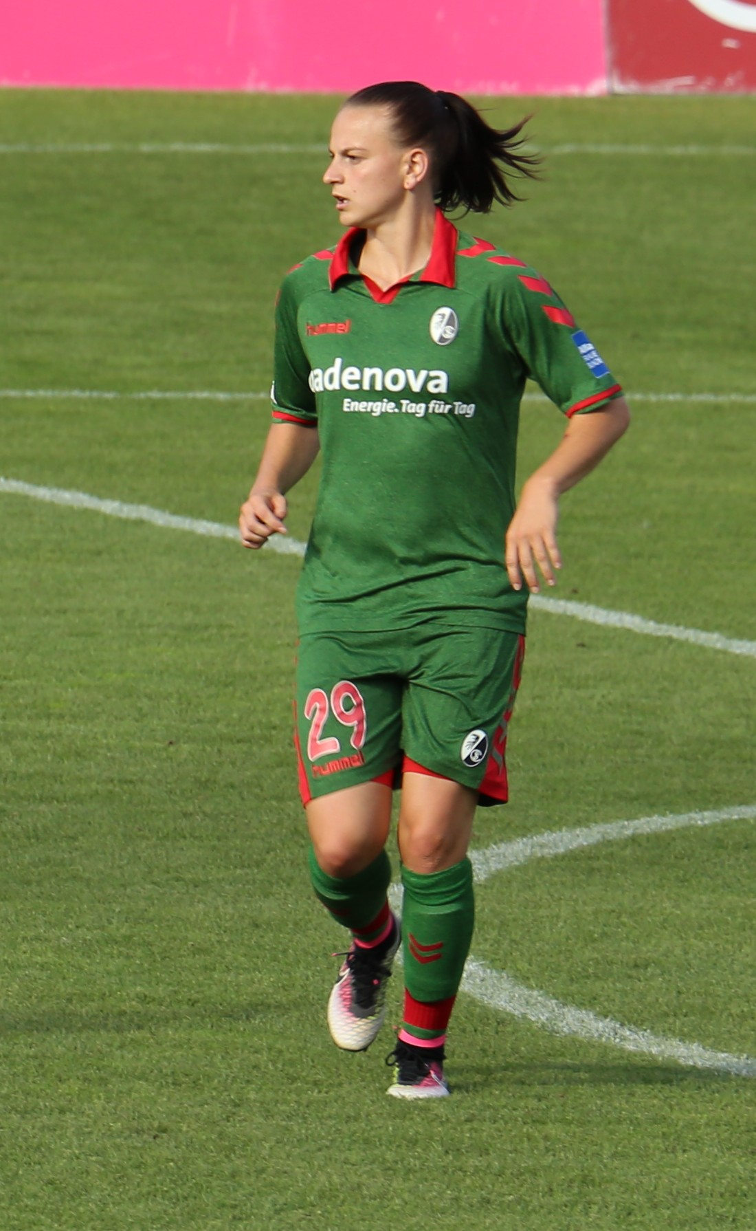 Jobina Lahr, SC Freiburg, beim Frauen-Bundesliga-Spiel FC Bayern München gegen SC Freiburg am 3. September 2016 im Stadion an der Grünwalder Straße (Ergebnis war 1:1).